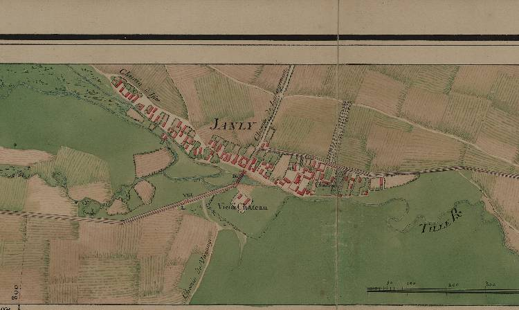 Carte de Janly, 1759.